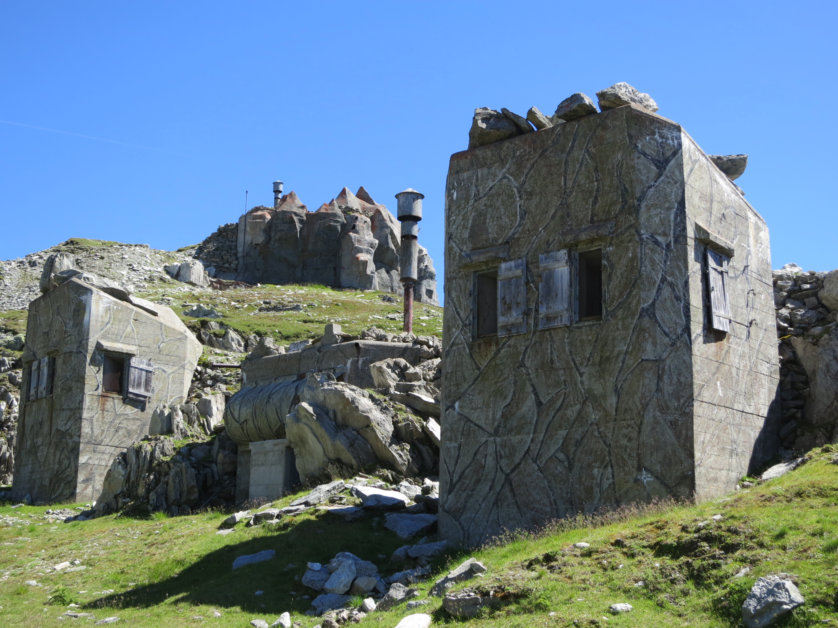 Artilleriewerk Gütsch, Andermatt UR, Schweiz